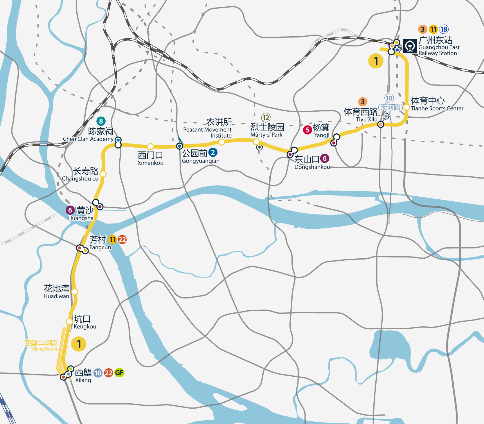 廣州地鐵1號線路線圖，按真實走向比例繪畫